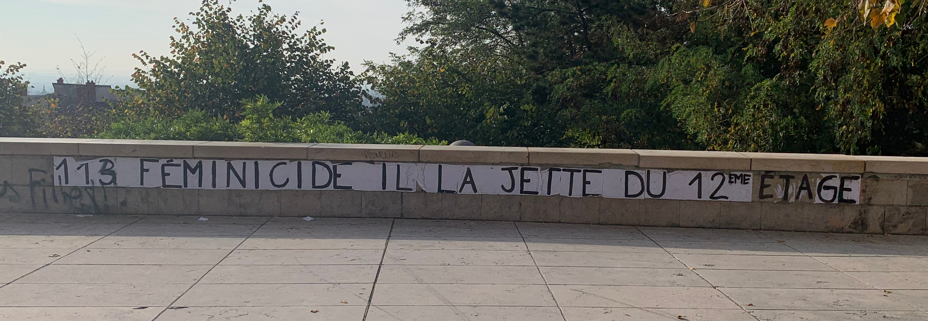 113e féminicide, il la jette du 12e étage : inscription photographiée Esplanade de la Grande-Côte (Lyon), en octobre 2019.